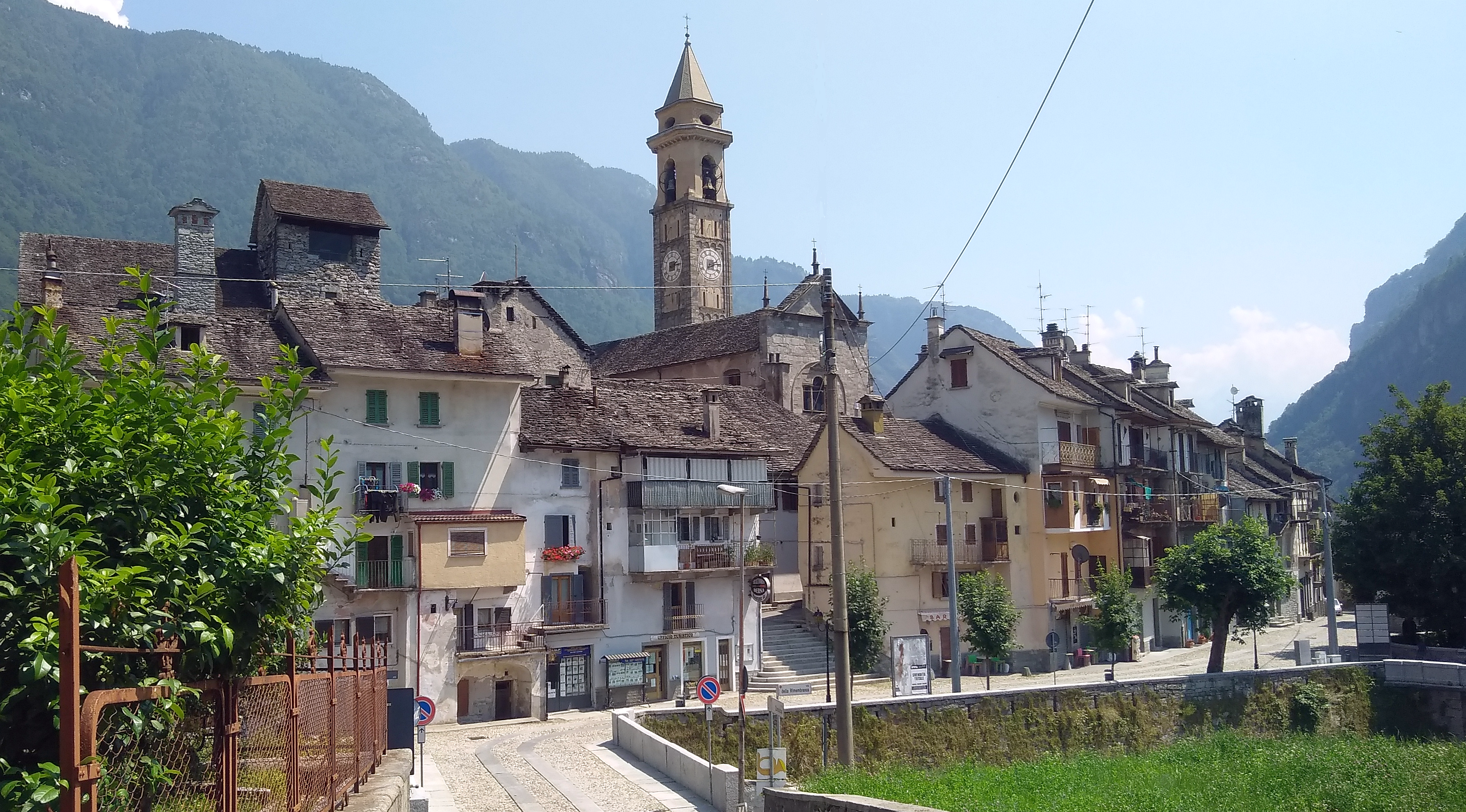 Varzo (VB): panorama del capoluogo